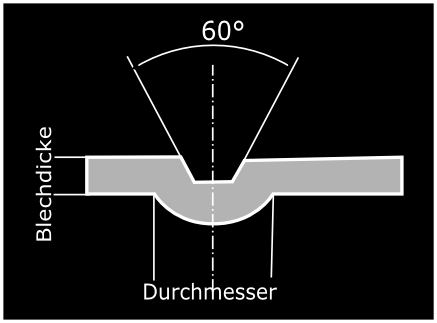 Buckelgeometrie nach EN 28167: 1992